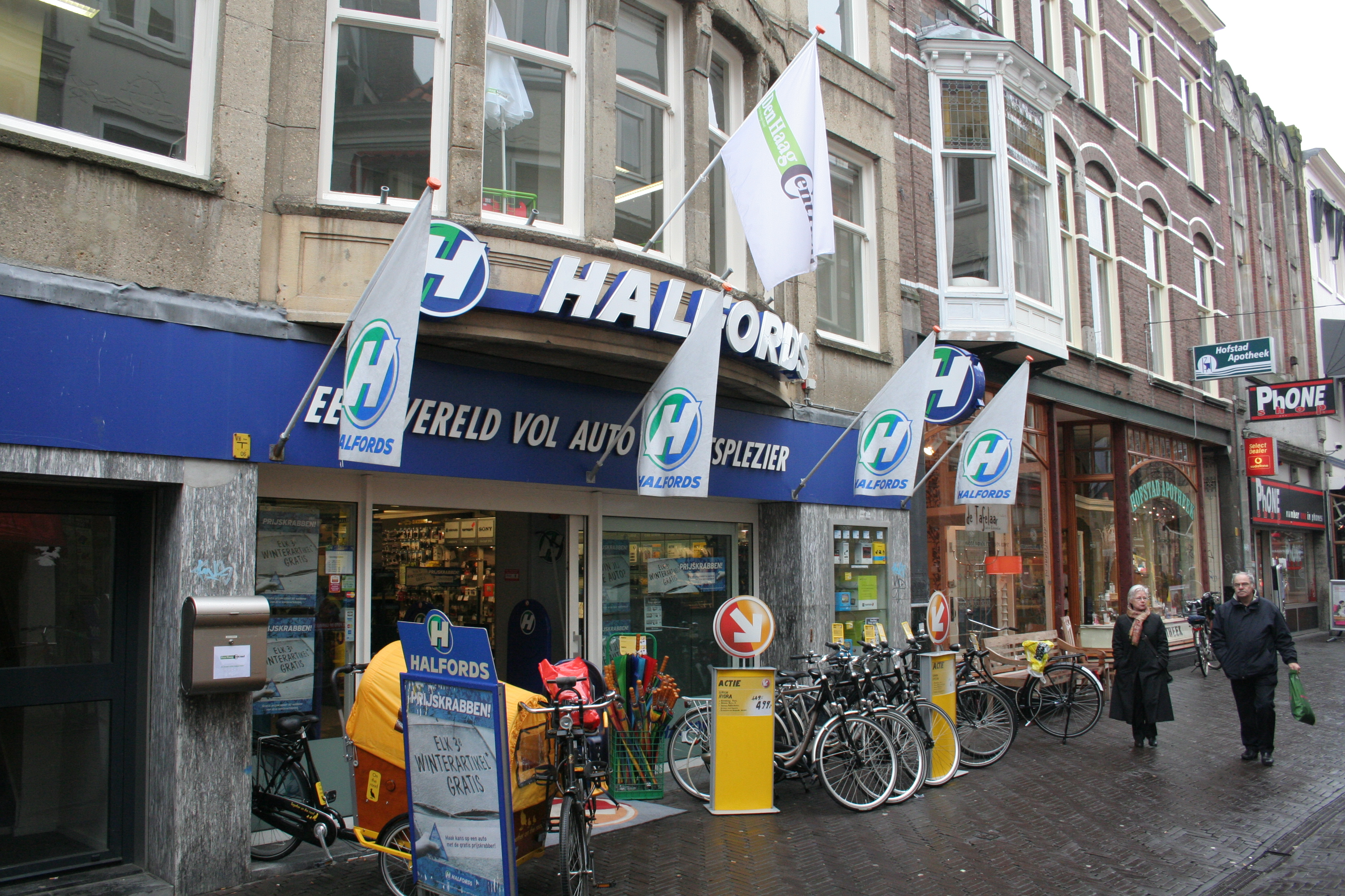 Halfords, Korte Poten, Den Haag